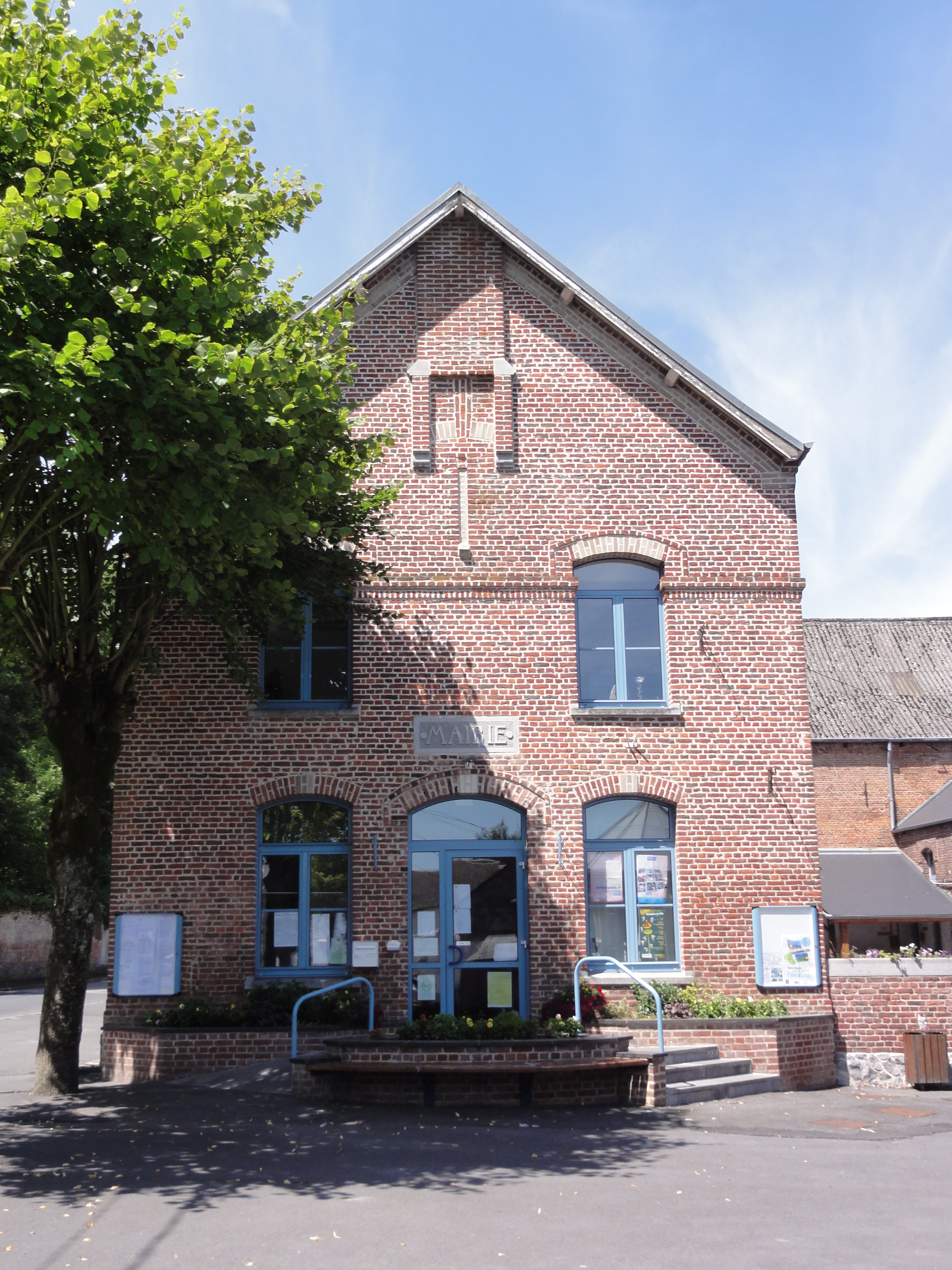 Bellignies (Nord, Fr) mairie